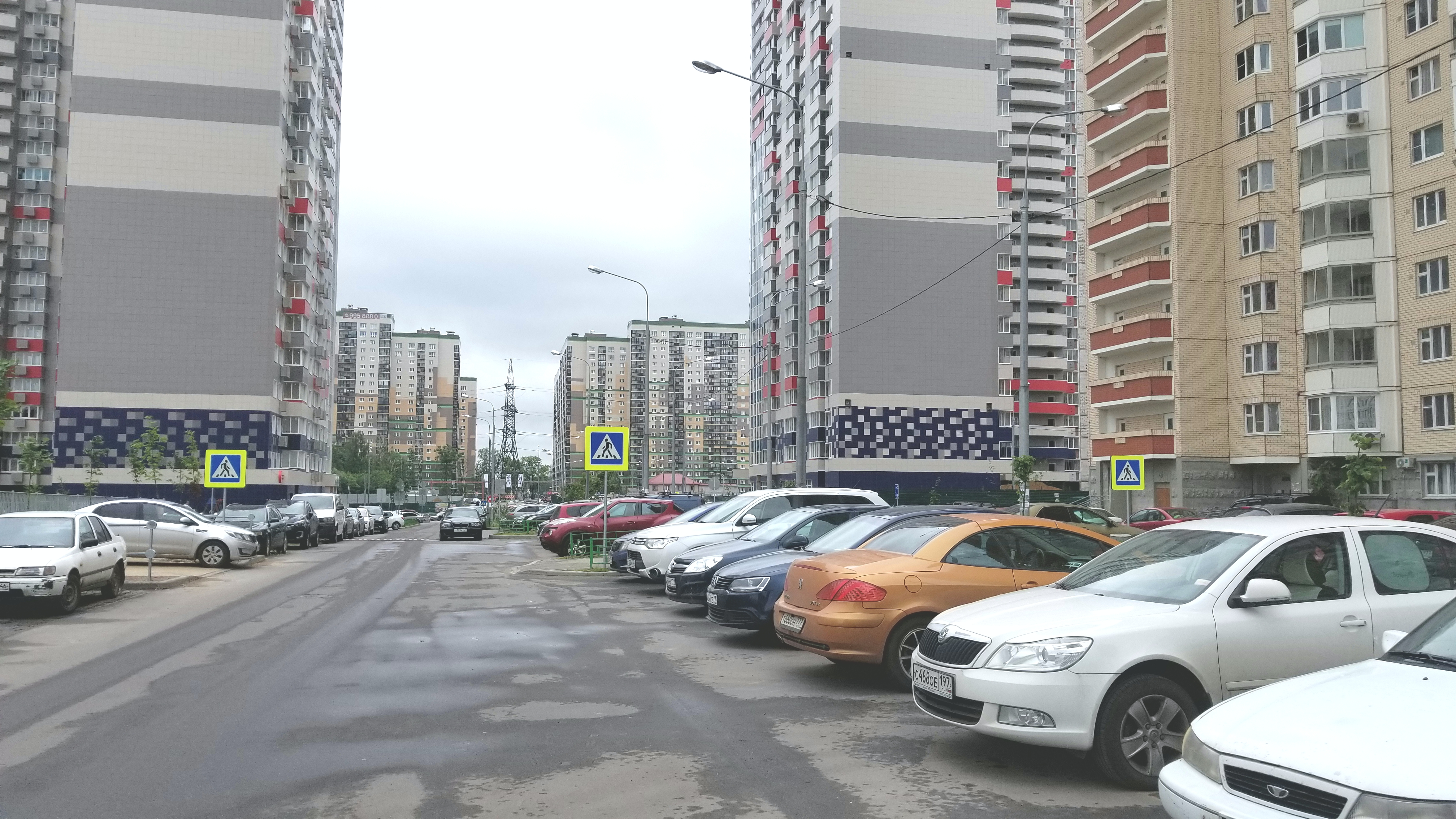 Спасо-Тушинский бульвар в Путилково (июнь 2017)